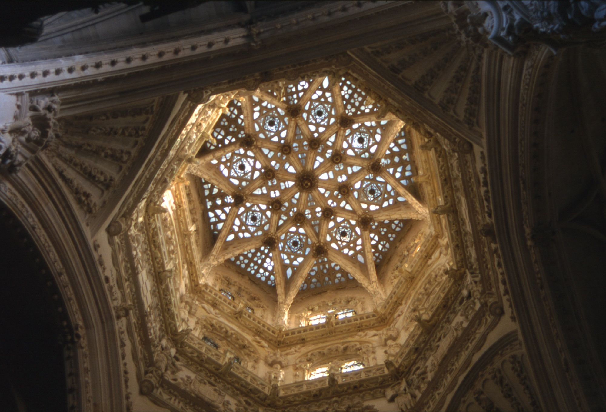 Vierung der Kathedrale von Burgos